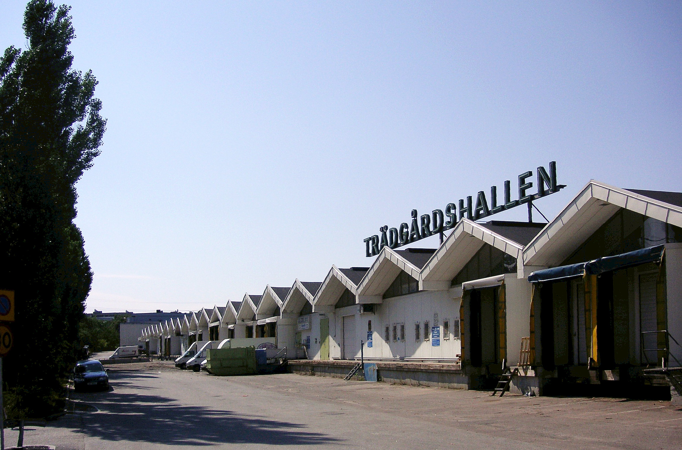 Trädgårdshallen